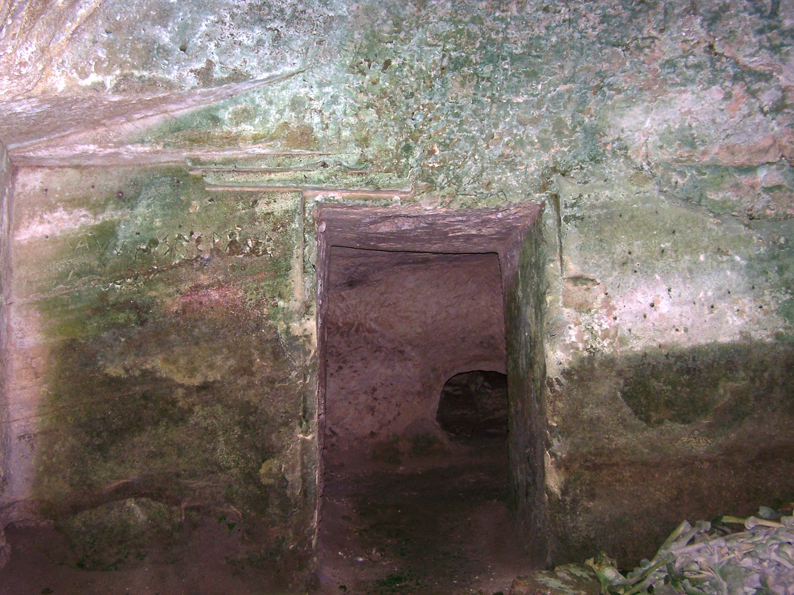 Militello. Tomba antica all'interno della torre normanna. La tomba presenta in facciata un falso frontone, ed epigrafe a caratteri greci arcaici.